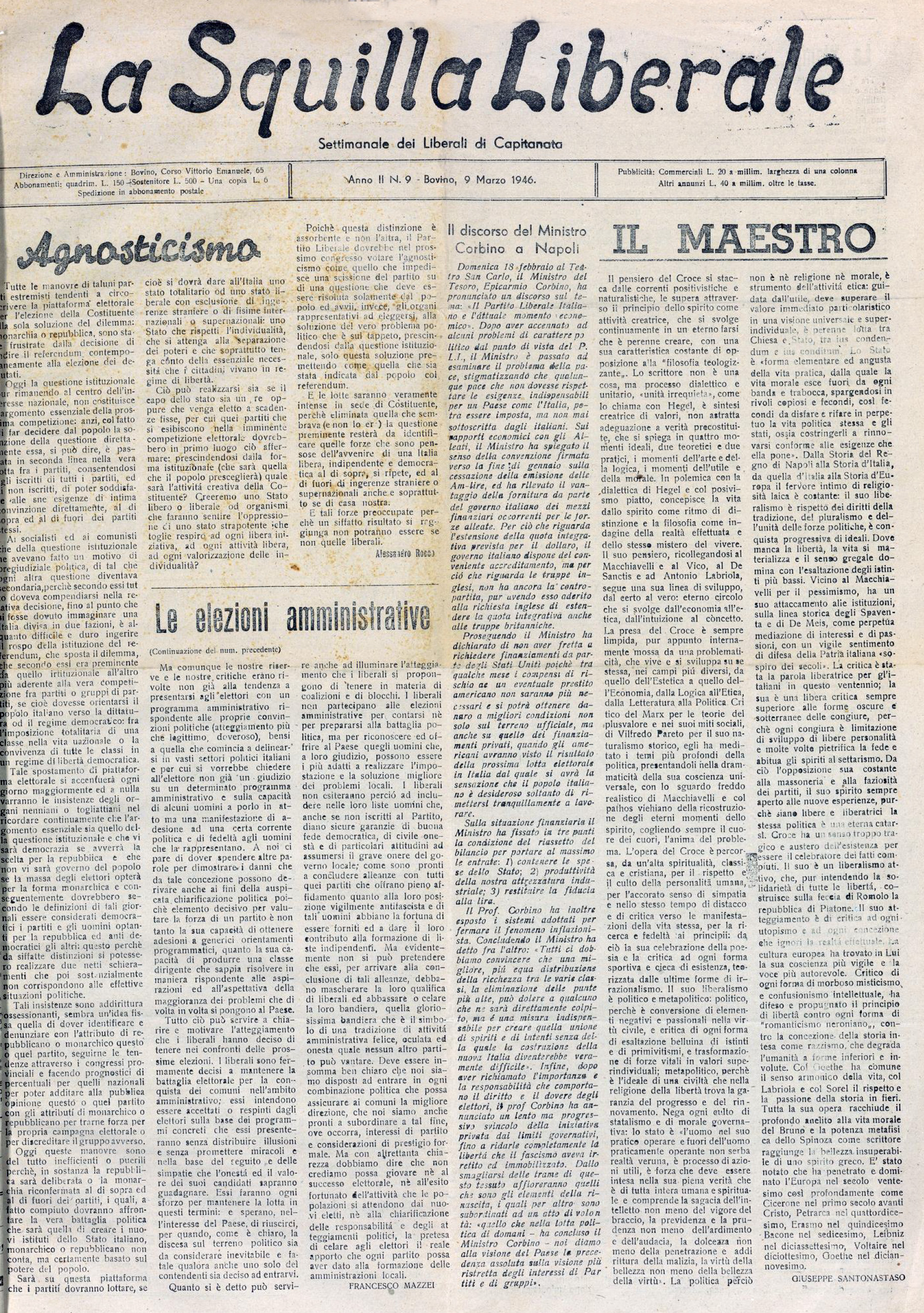 La "Squilla liberale" del 9 marzo 1946